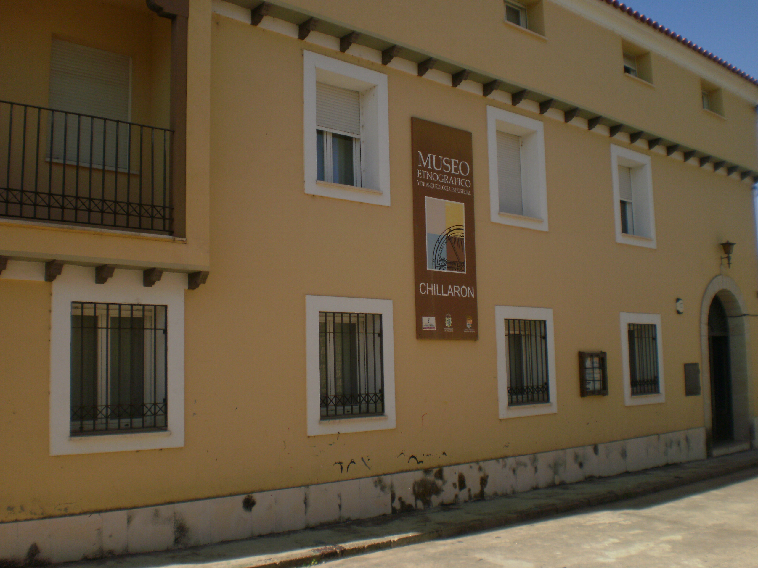 Chillaron de Cuenca herria, Gaztela La Mantxa.